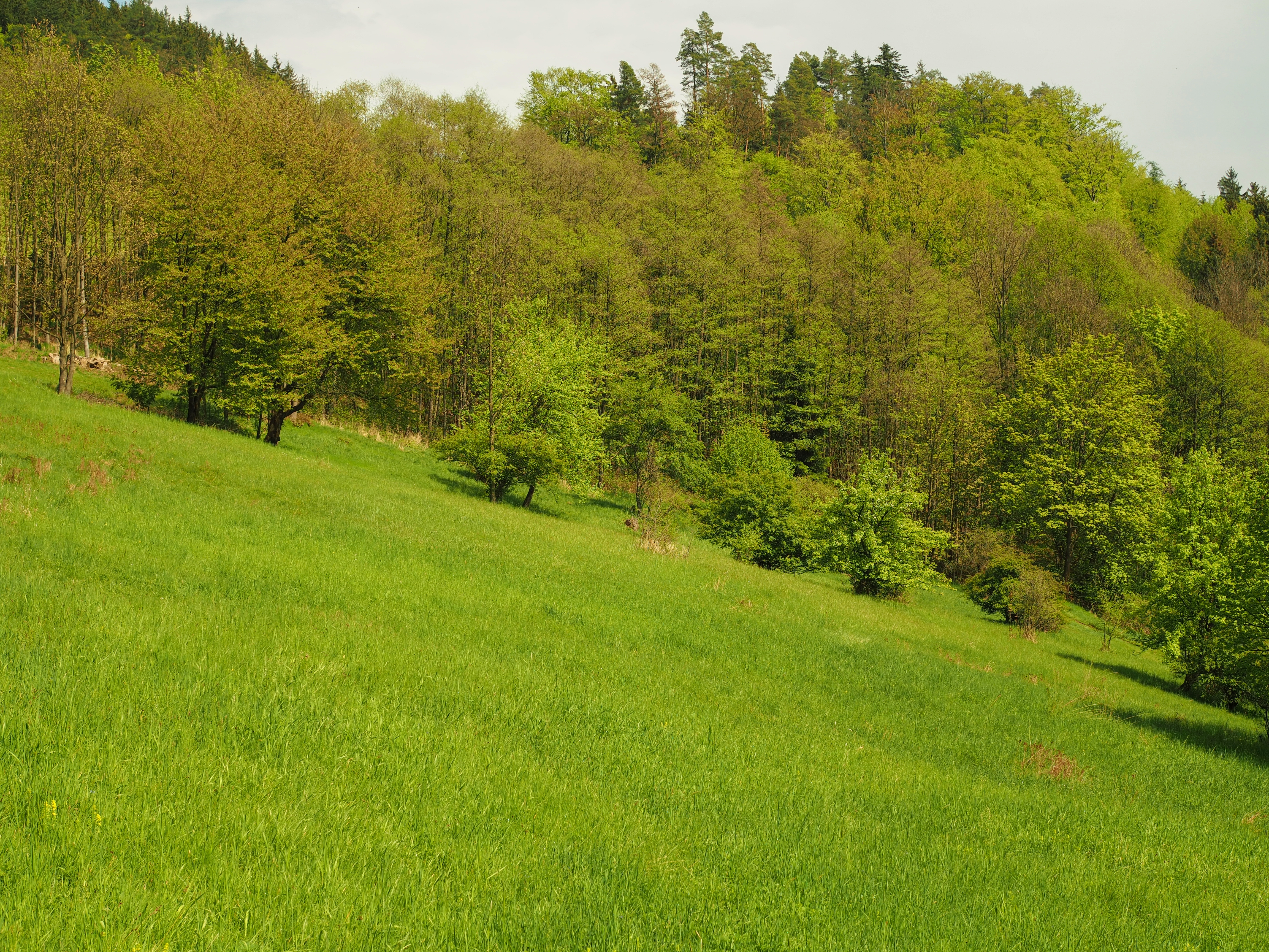 Přírodní památka Na Ostrážné (Natural monument Na Ostrážné) Project: Chráněná území